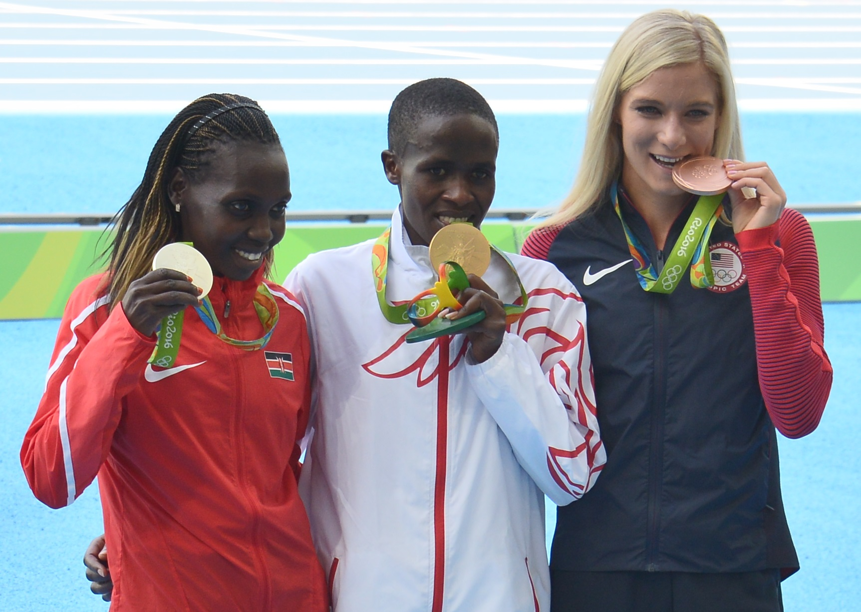 Le podium du 3000m steeple féminin des jo d'été 2016 à Rio